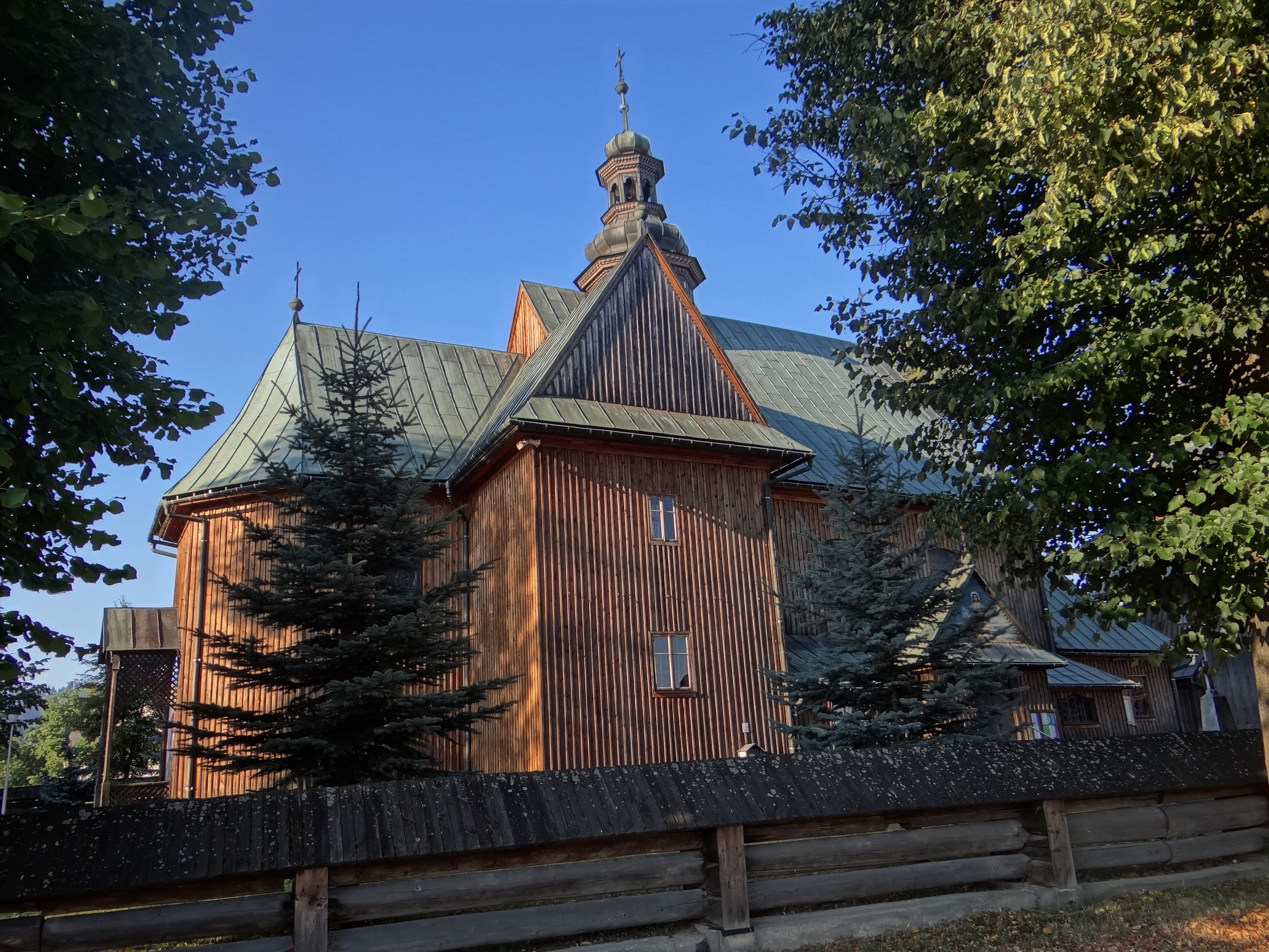 Kosćiół w Spytkowicach